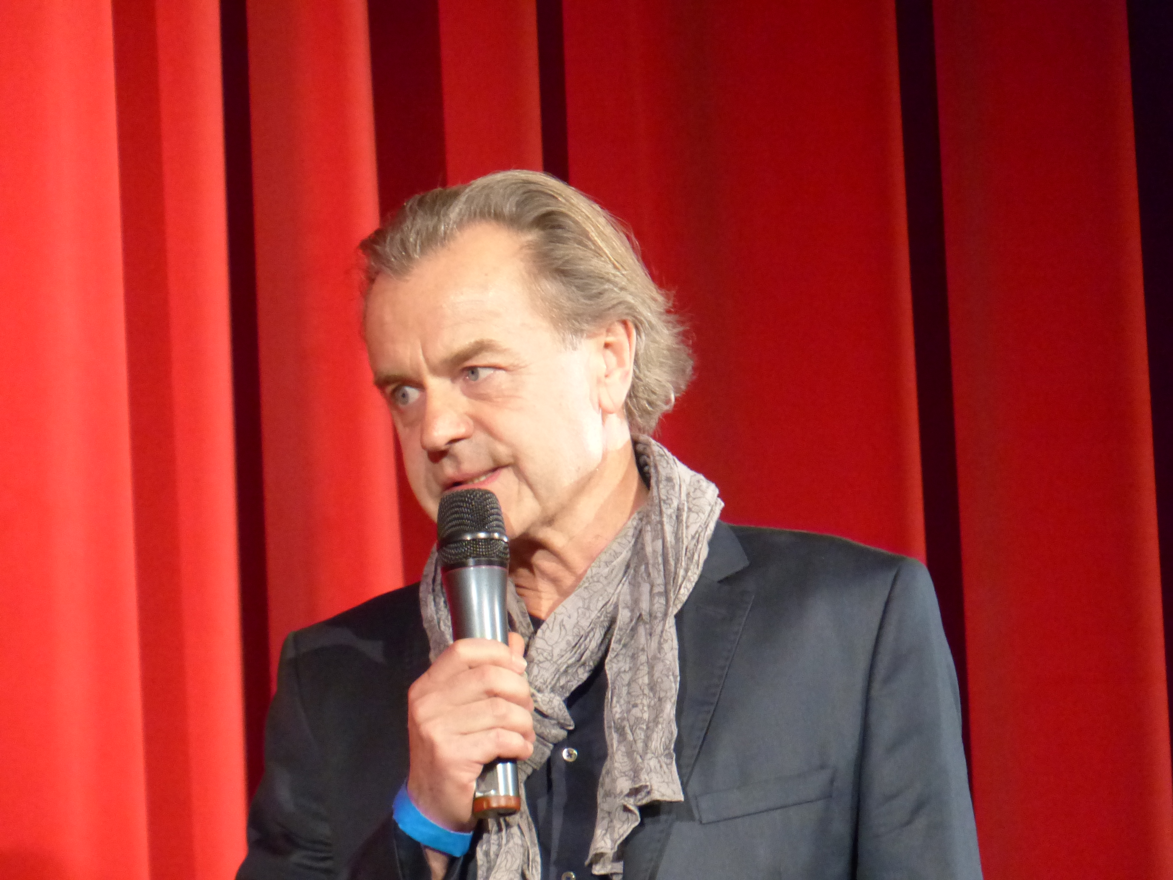 Ralf Huettner (Regie) bei der Premiere von "Der Koch", November 2014